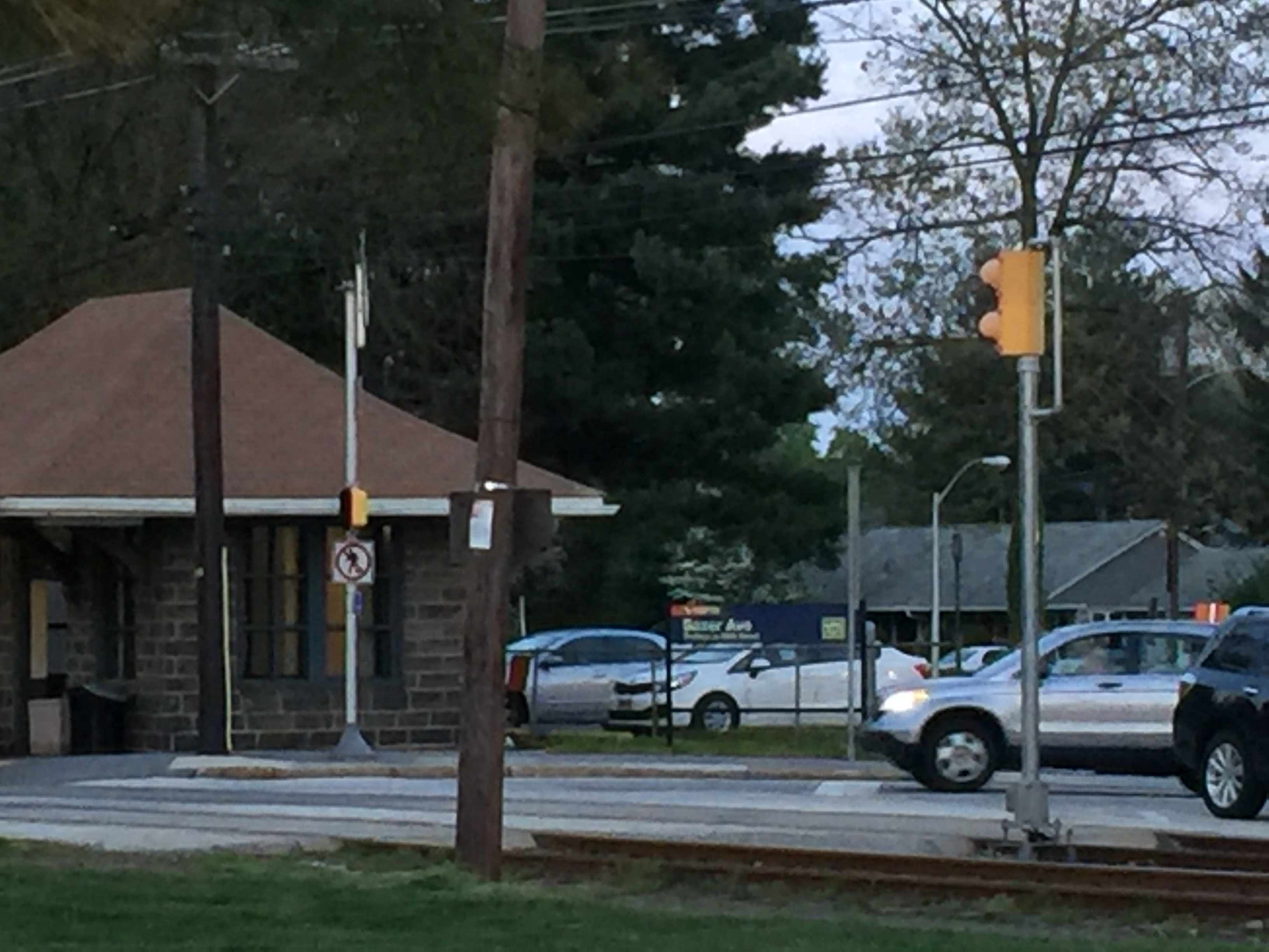 Saxer Avenue station